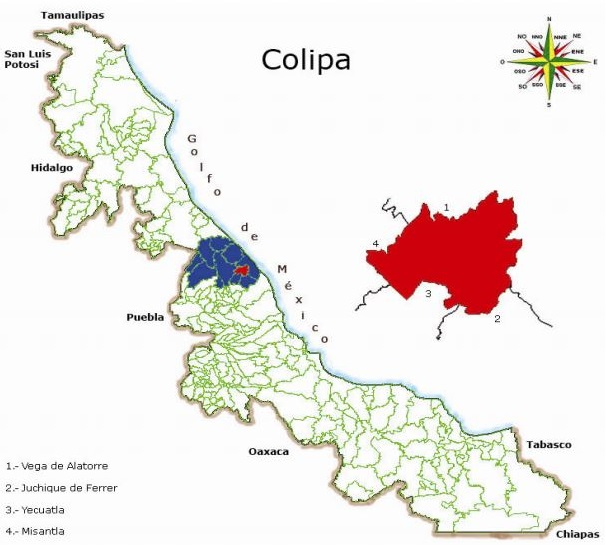 Limites del Municipio